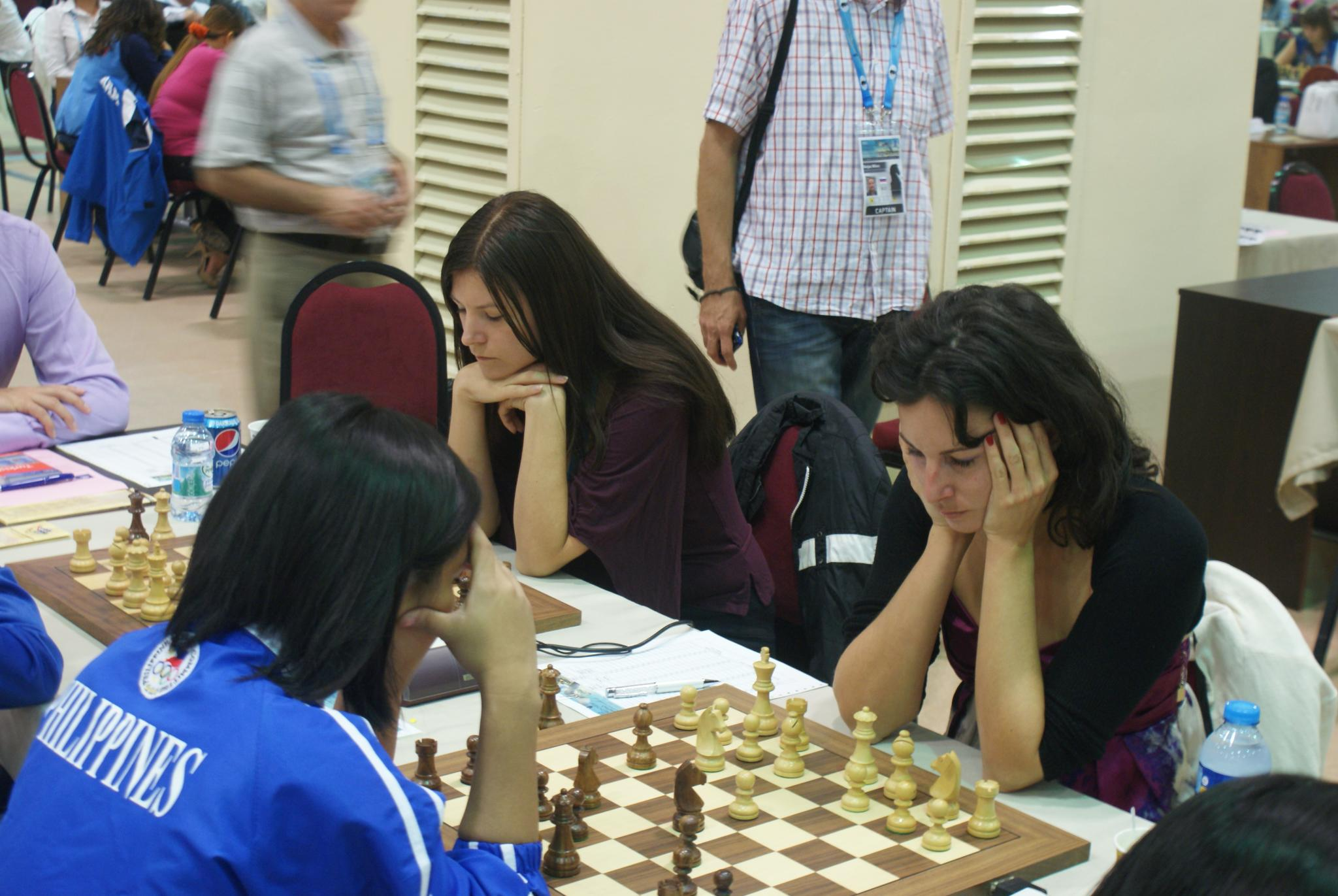 40 Olimpíades d'Escacs - Istanbul Ronda 02, 29 d'agost del 2012